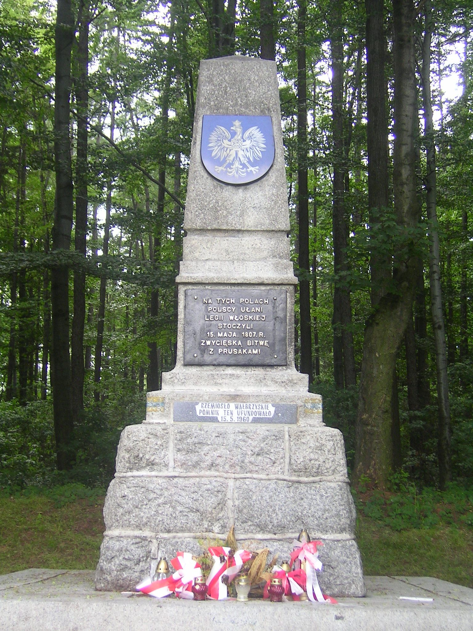 Pomnik ku czci Ułanów Legii Nadwiślańskiej na Czerwonym Wzgórzu koło Szczawna Zdroju